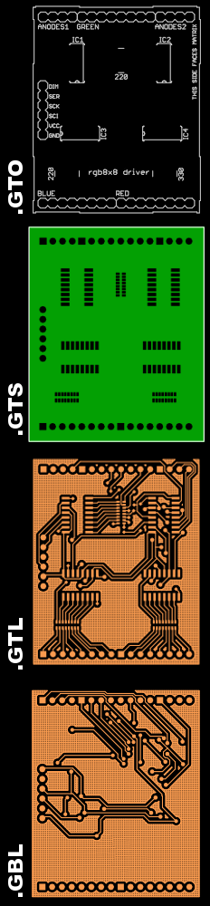 Board design and Gerber file format image